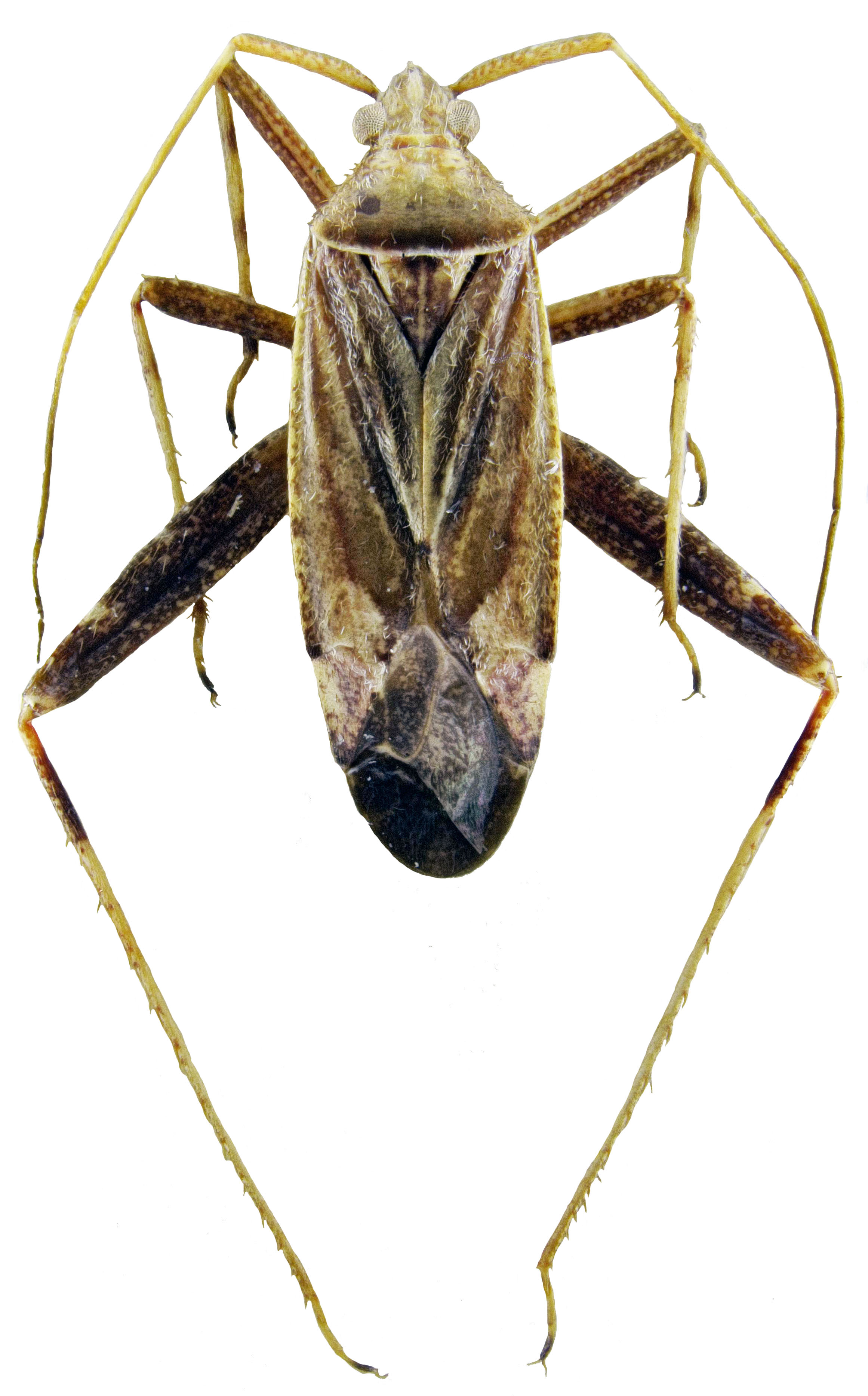 Phytocoris varipes, Habitus, specimen in Zoologische Staatssammlung München, Foto: Marianne Müller